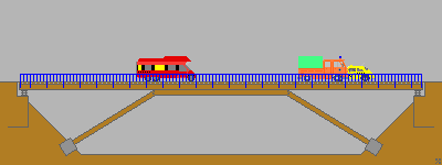 Sprengwerk